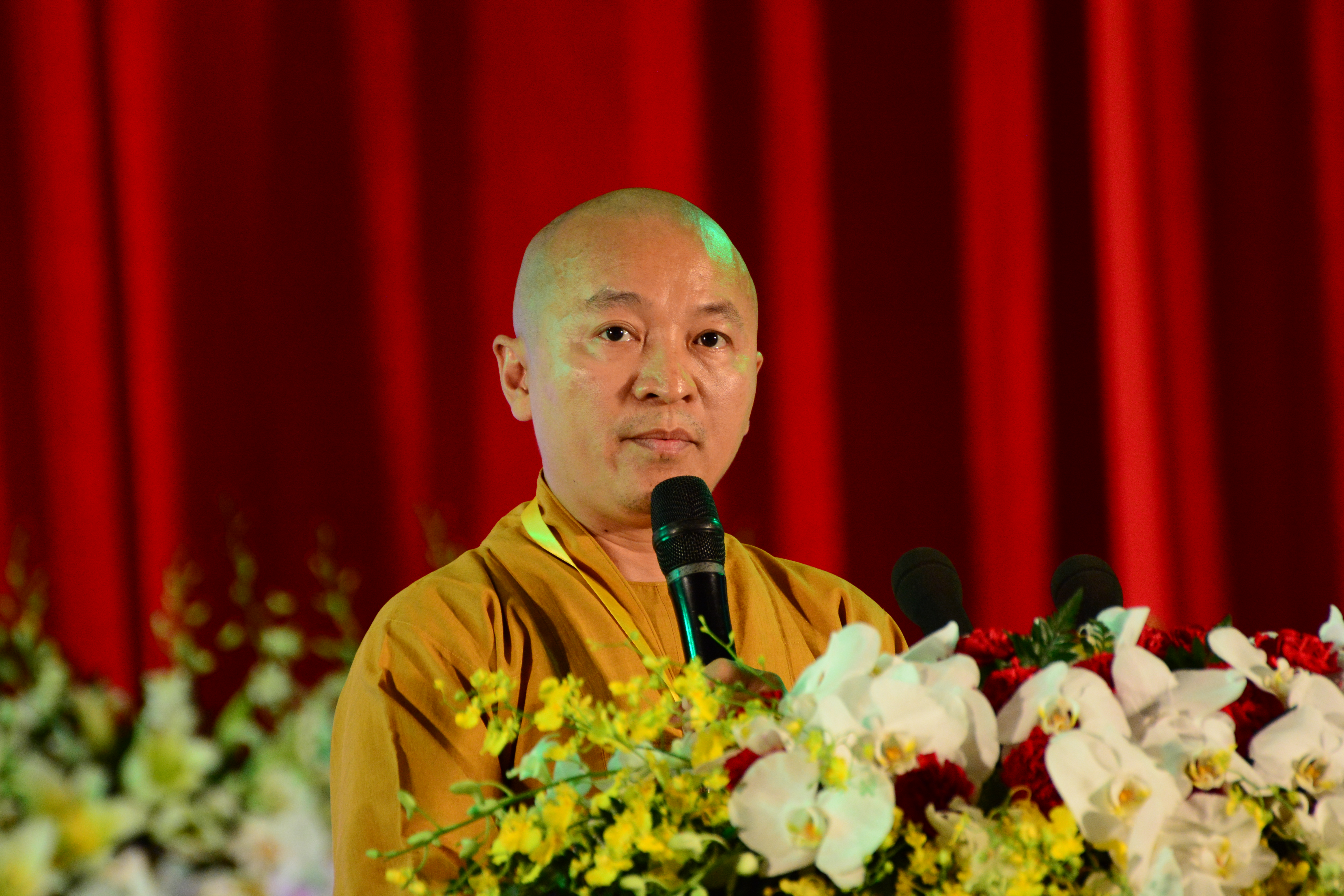 TT. Thích Nhật Từ phát biểu trong lễ bế mạc Đại lễ Vesak 2014 tại chùa Bái Đính, Ninh Bình, Việt Nam ngày 10/05/2014.